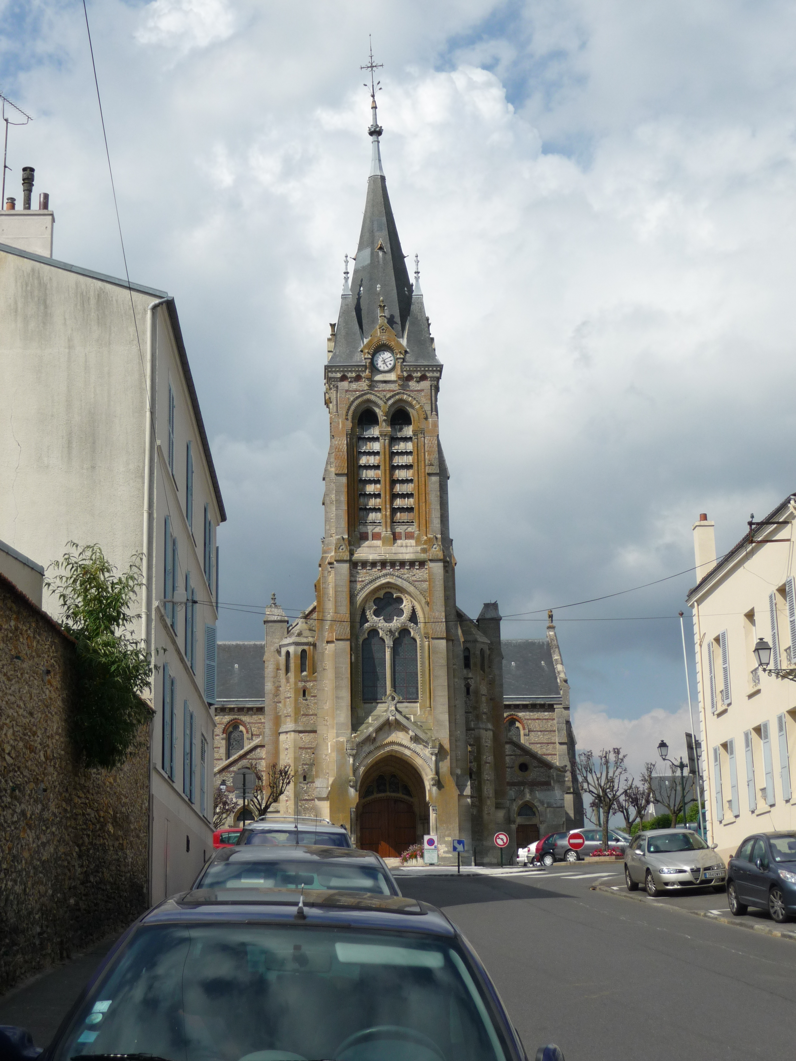 Photo de l'Église St-Lubin de Rambouillet, rue de la République